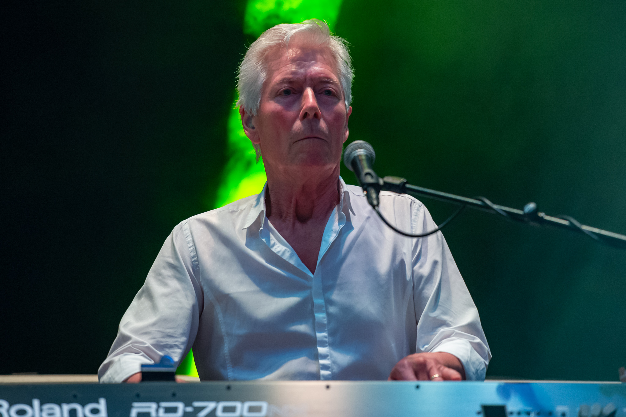 Andy Bown,Brombachsee,Concertbüro Franken,Festival,Konzert,Lieder am See,Livekonzert,Livemusik,Musik,Status Quo